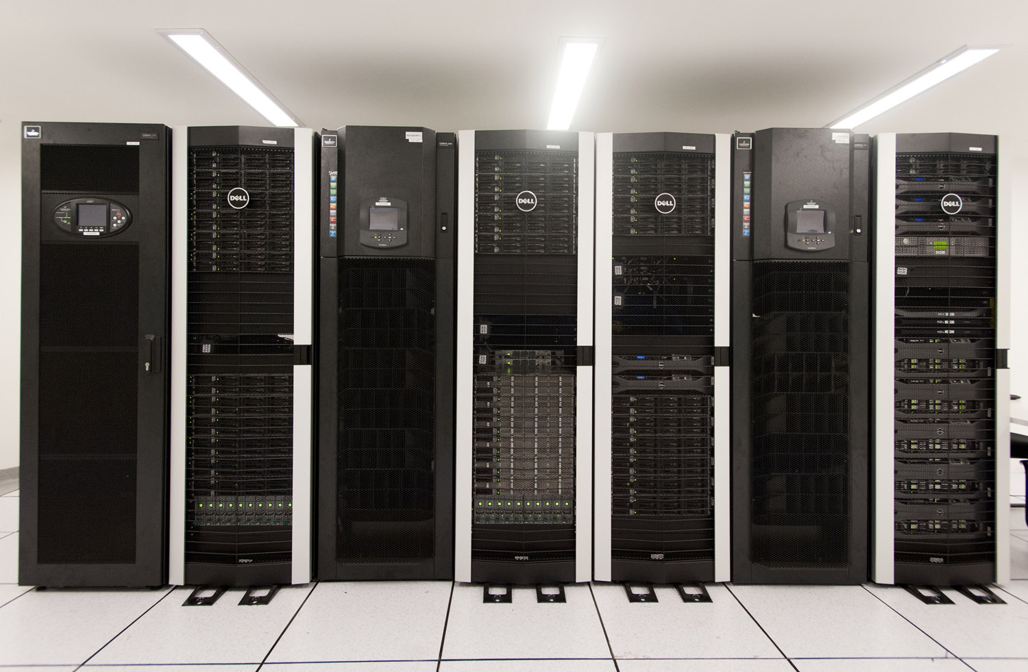 Cluster Tupac